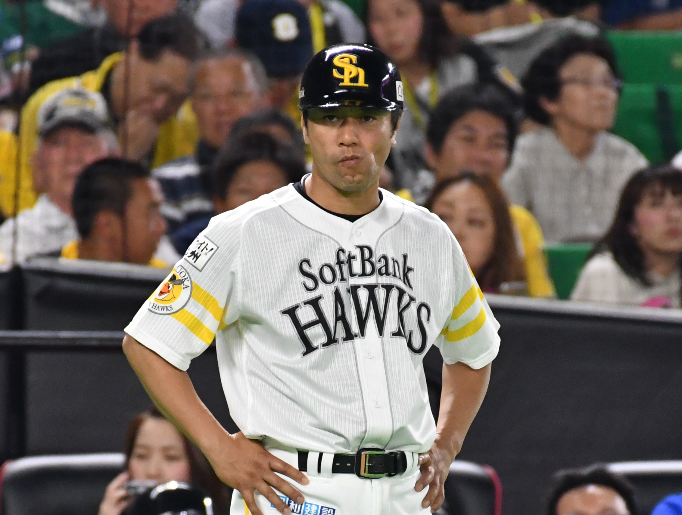 村松 有人（むらまつ ありひと）石川県金沢市出身の元プロ野球選手（外野手、左投左打）2017年から福岡ソフトバンクホークスの一軍外野守備走塁コーチ（三塁ベースコーチ）